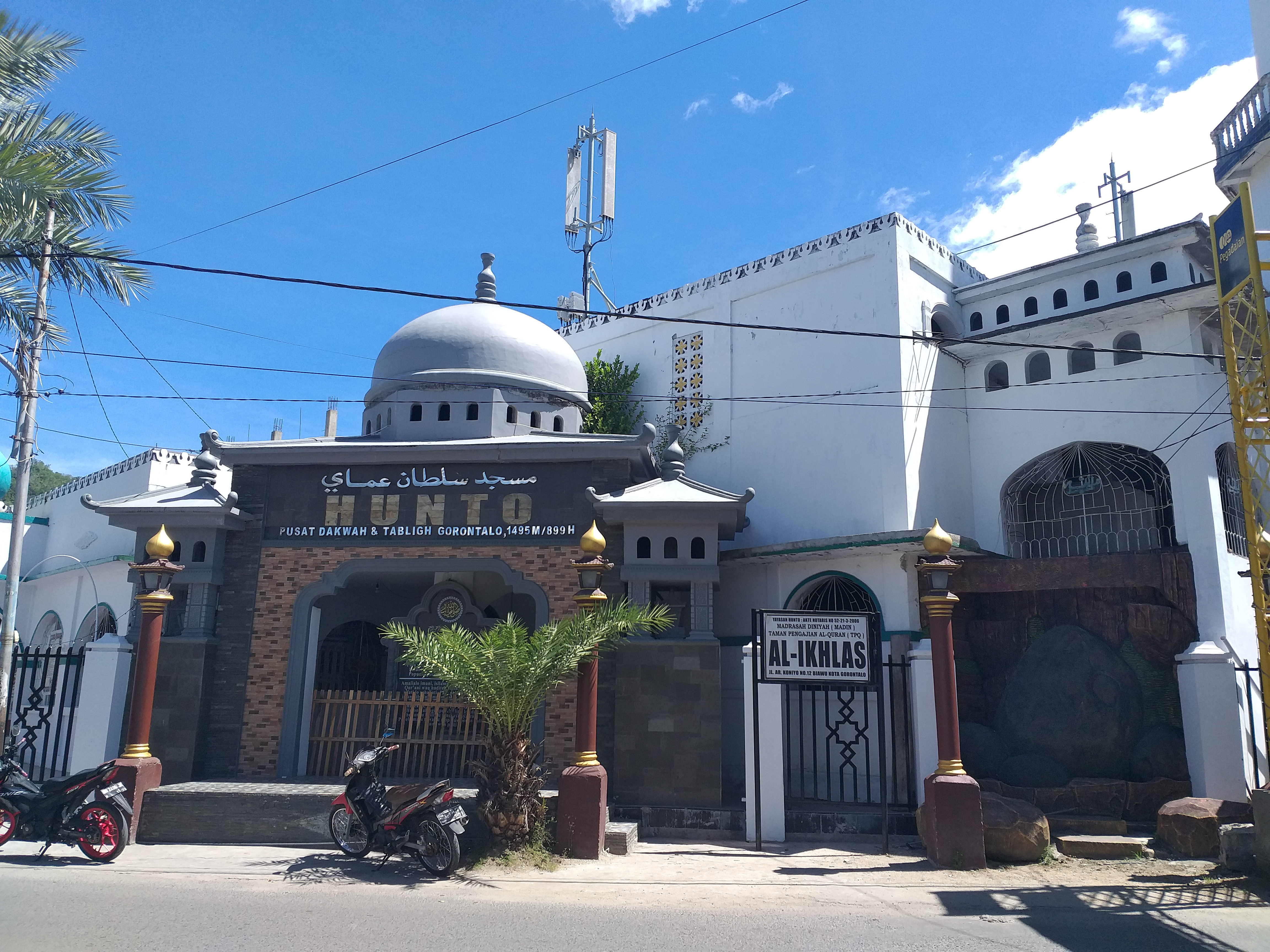 Masjid Hunto Sultan Amai adalah masjid tertua yang di Provinsi Gorontalo. Masjid ini dibangun pada tahun 1495 oleh Sultan Amai, pemimpin Kerajaan Gorontalo yang pertama kali masuk Islam dan diberi nama Masjid Hunto Sultan Amai. Hunto singkatan dari Ilohuntungo berarti basis atau pusat perkumpulan agama Islam kala itu. Lokasi Masjid Hunto Sultan Amai berada di Kelurahan Biawu, Kecamatan Kota Selatan, Kota Gorontalo.